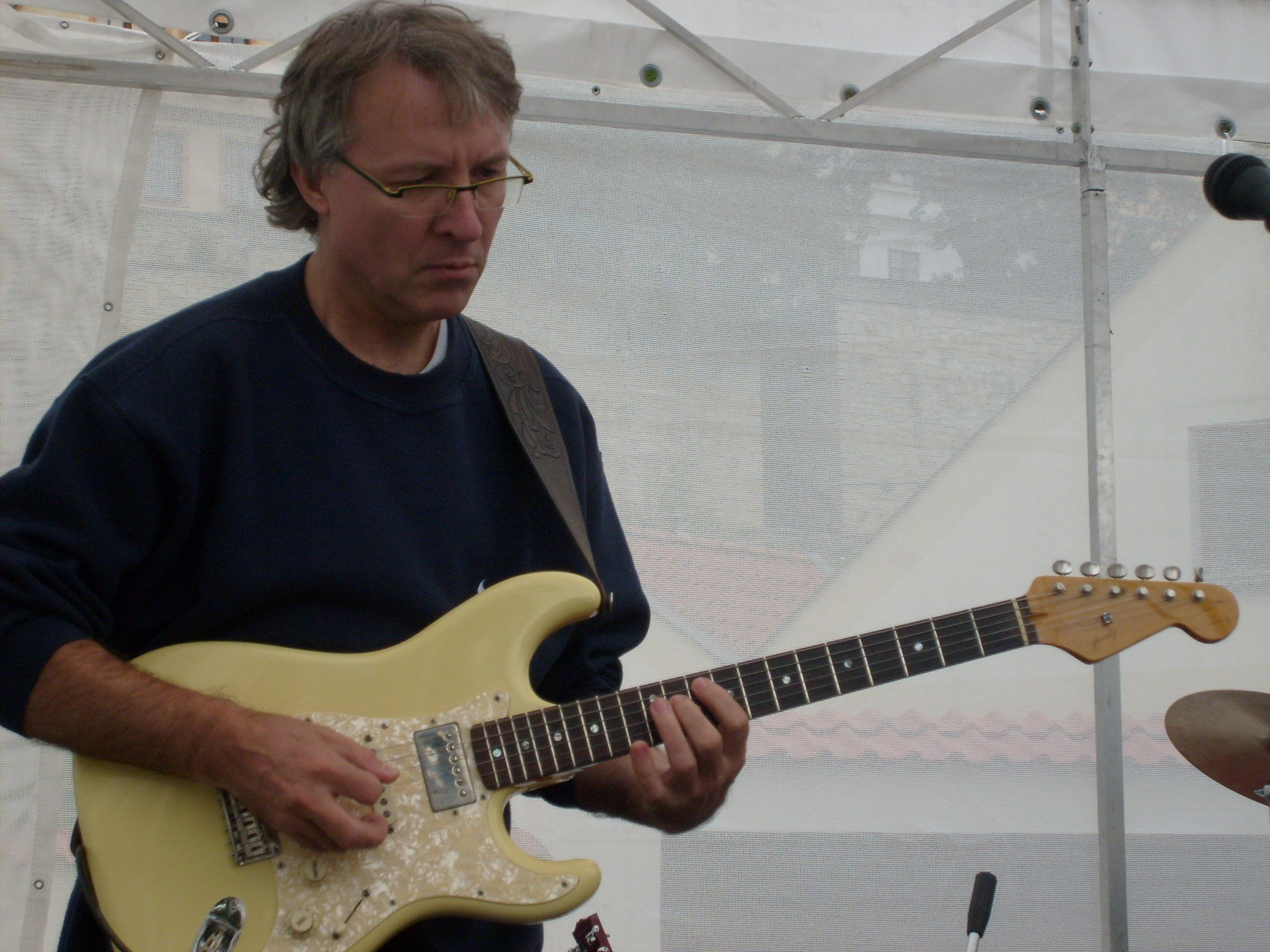 Vladimír Mišík a Etc..., Chrudim